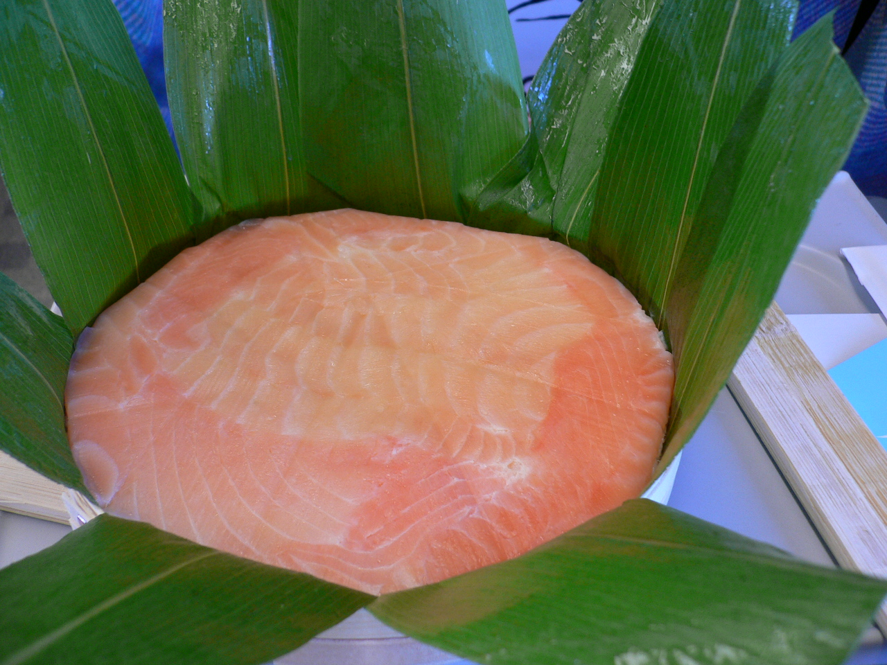 ますのすし (鱒寿司)